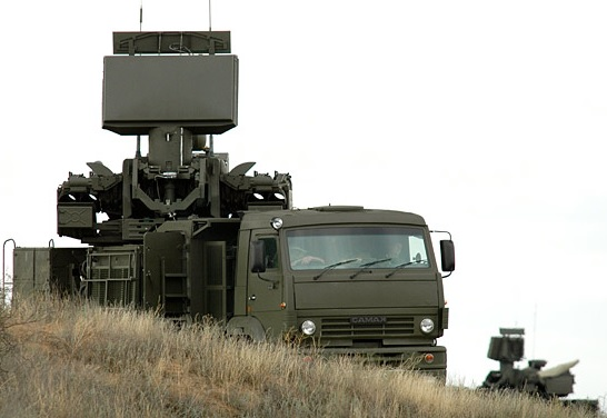 This file comes from the websites (mil.ru, минобороны.рф) of the Ministry of Defence of the Russian Federation and is copyrighted.This file is licenced under the Creative Commons Attribution 4.0 Licence.In short: you are free to distribute and modify the file as long as you attribute Mil.ru. Attribution: Mil.ru